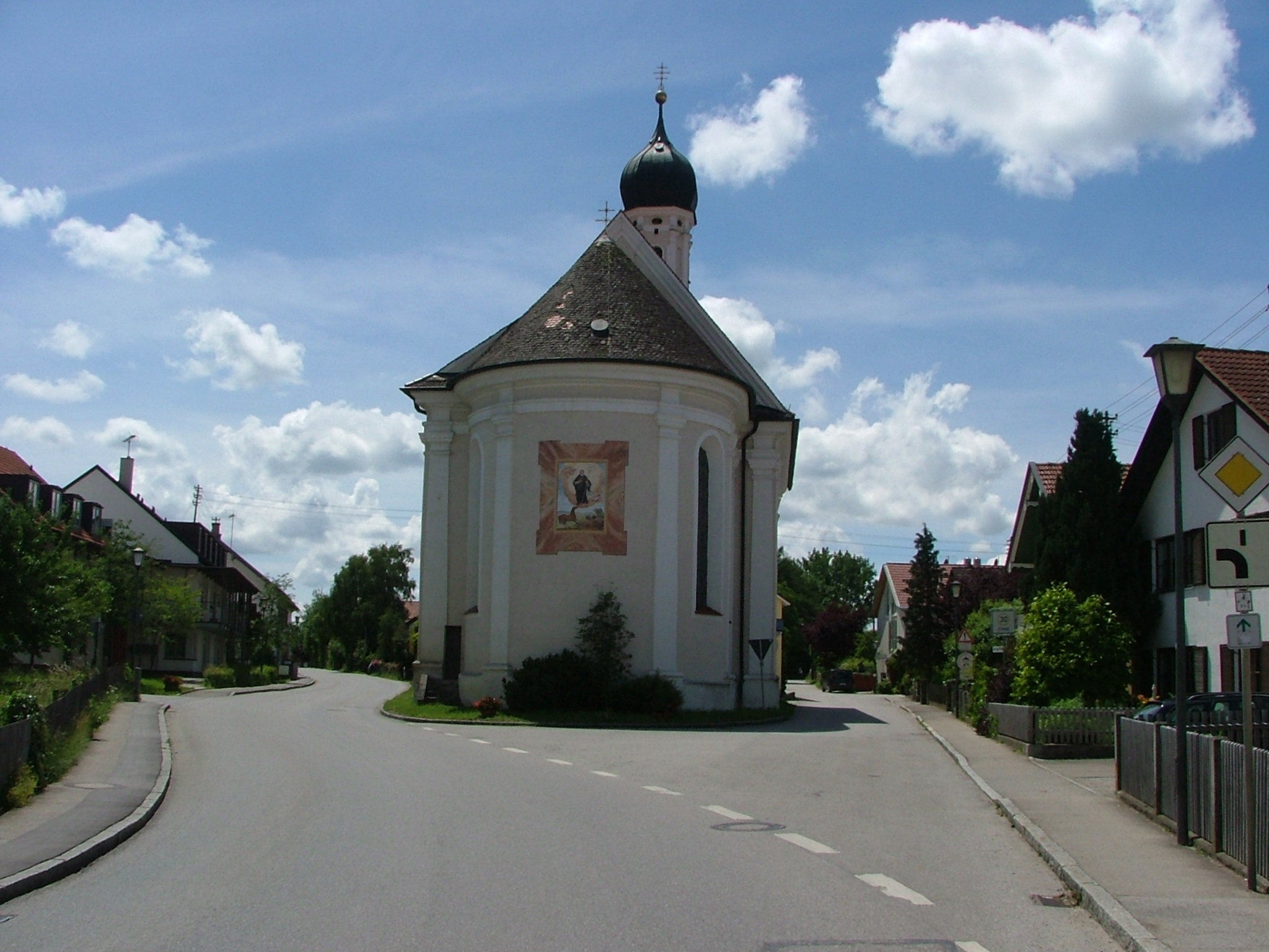 Utting Leonhardkapelle